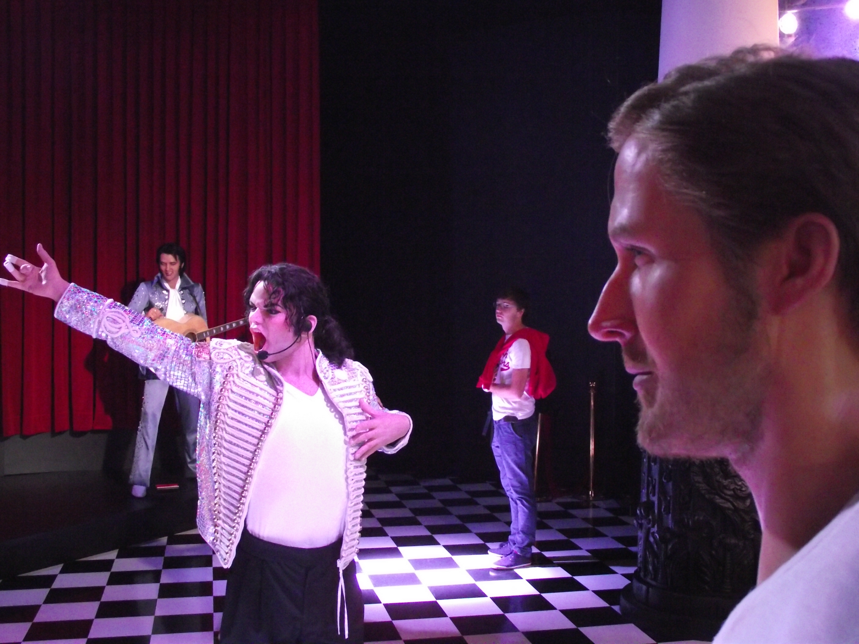 Michael Jackson et Ryan Gosling au Musée Grévin Montréal